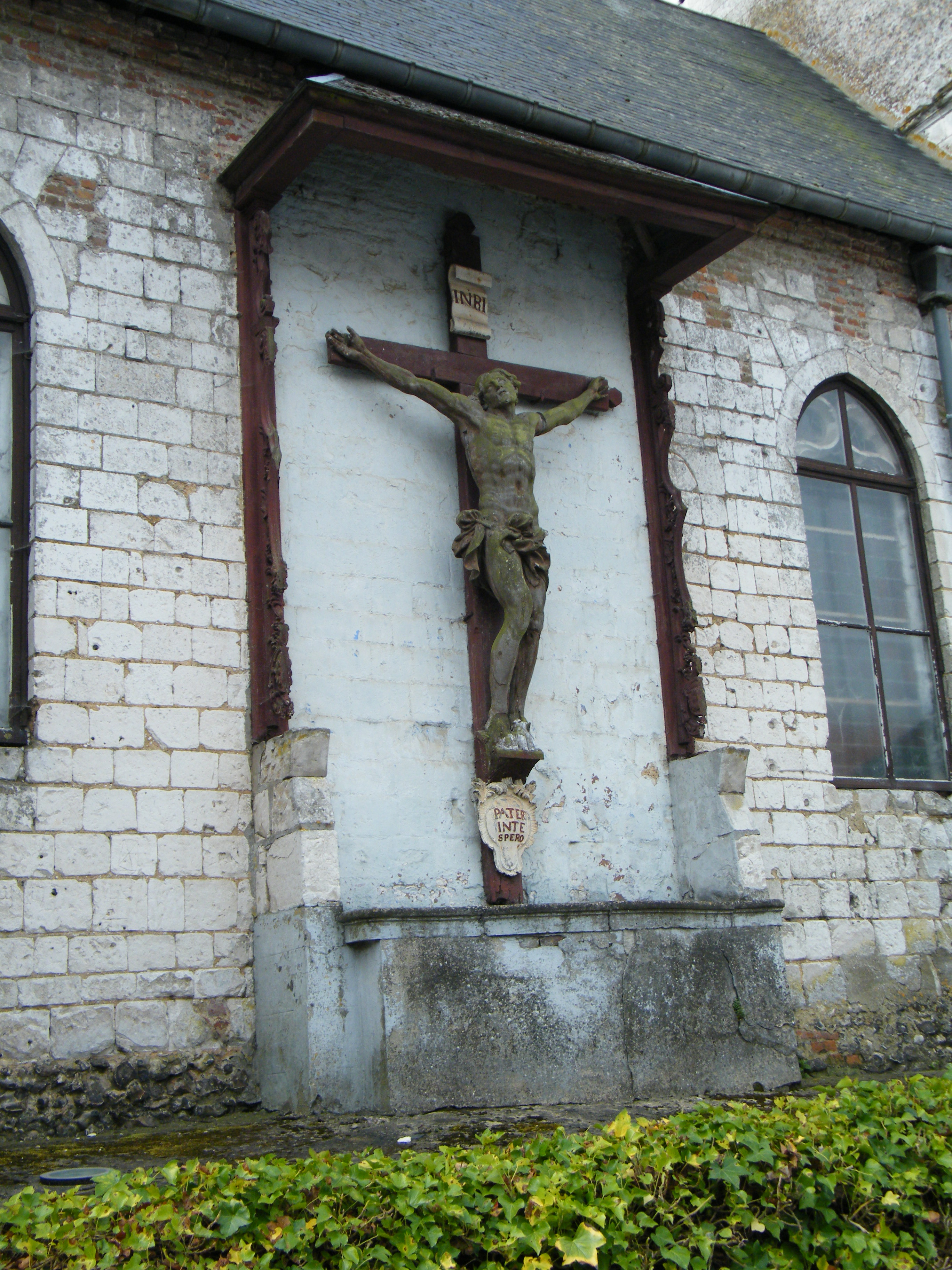 Gouy-Saint-André, Pas-de-Calais, Fr, calvaire sur l'église, sculpté par Pfaffenhoffen.